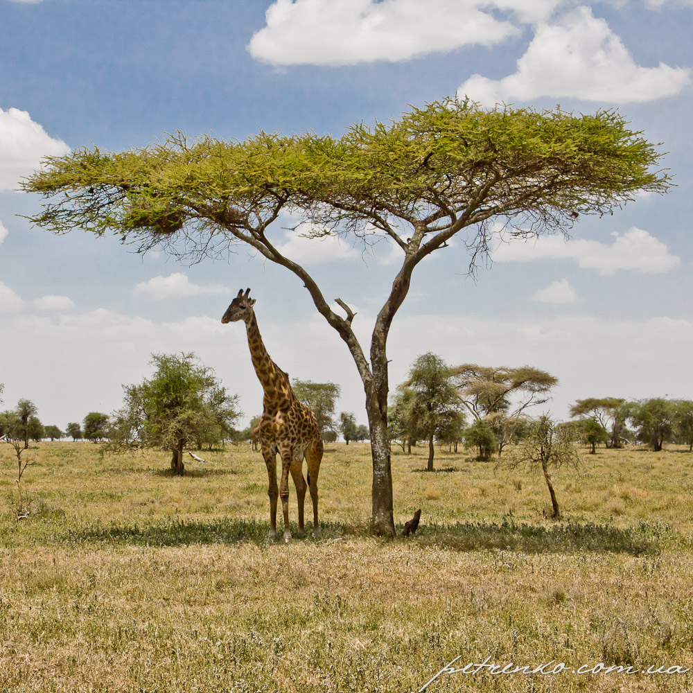 Bariadi, Tanzania